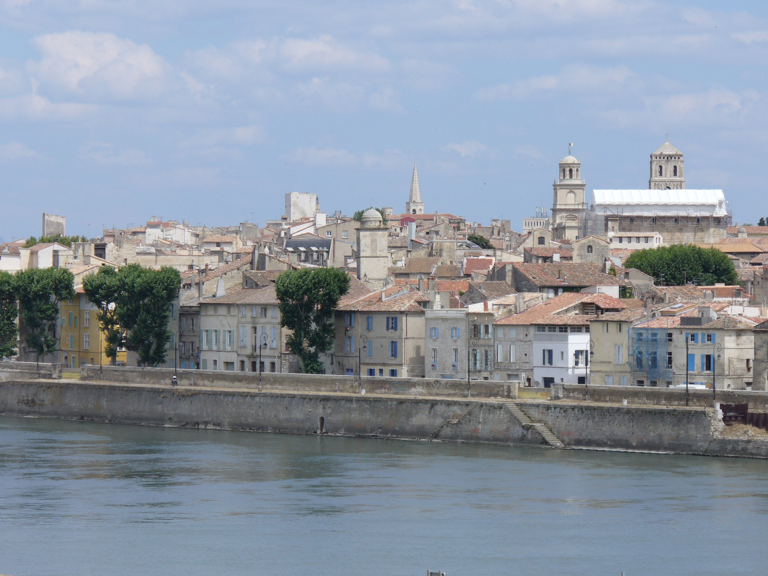 Blick vom Ufer der Rhone auf Arles-Provence